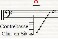 Etendue de l'instrument. Notes réelles (en ut) entendues. Les notes sur la partition sont écrites deux octave + une seconde majeure au-dessus. La ronde en rouge est le LA(3) à 440 Hz.